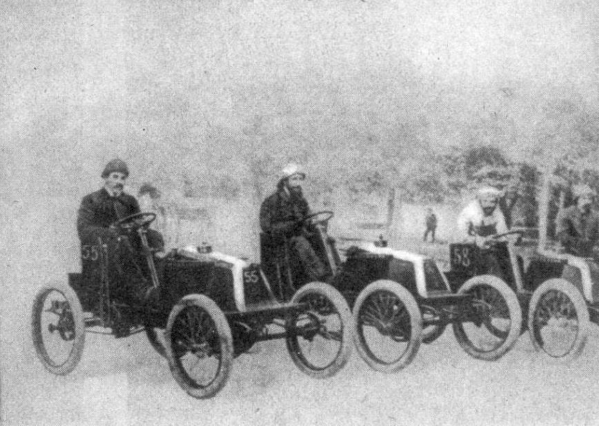 Louis (G.) et Marcel (centre) Renault, au départ de Paris-Bordeaux 1901 (à D. Oury, aussi sur Renault).